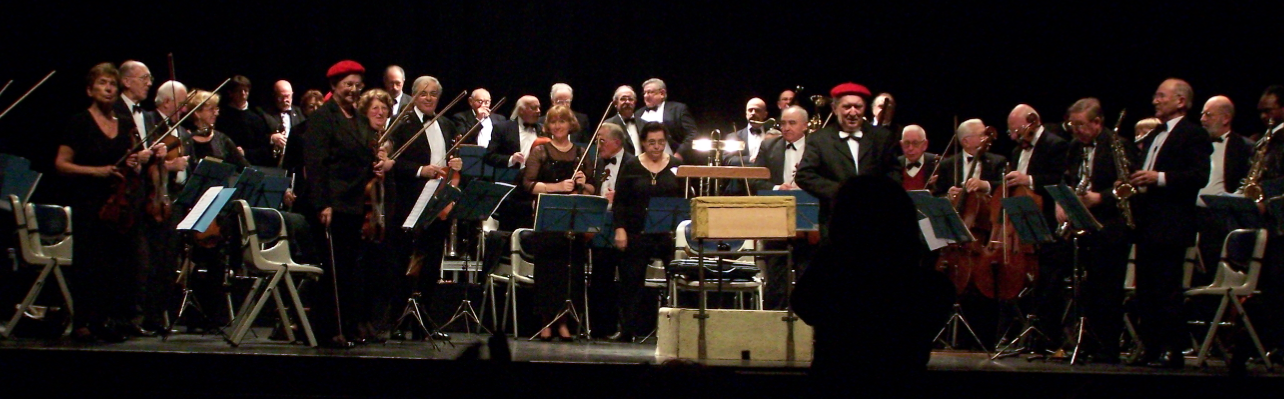 Orchestre Symphonique de Talence - 2012 - sous la direction de Jean-Marie Pétrou & violon solo Josette Claverie (bérets rouges) - Espace Médoquine - Talence (Gironde)